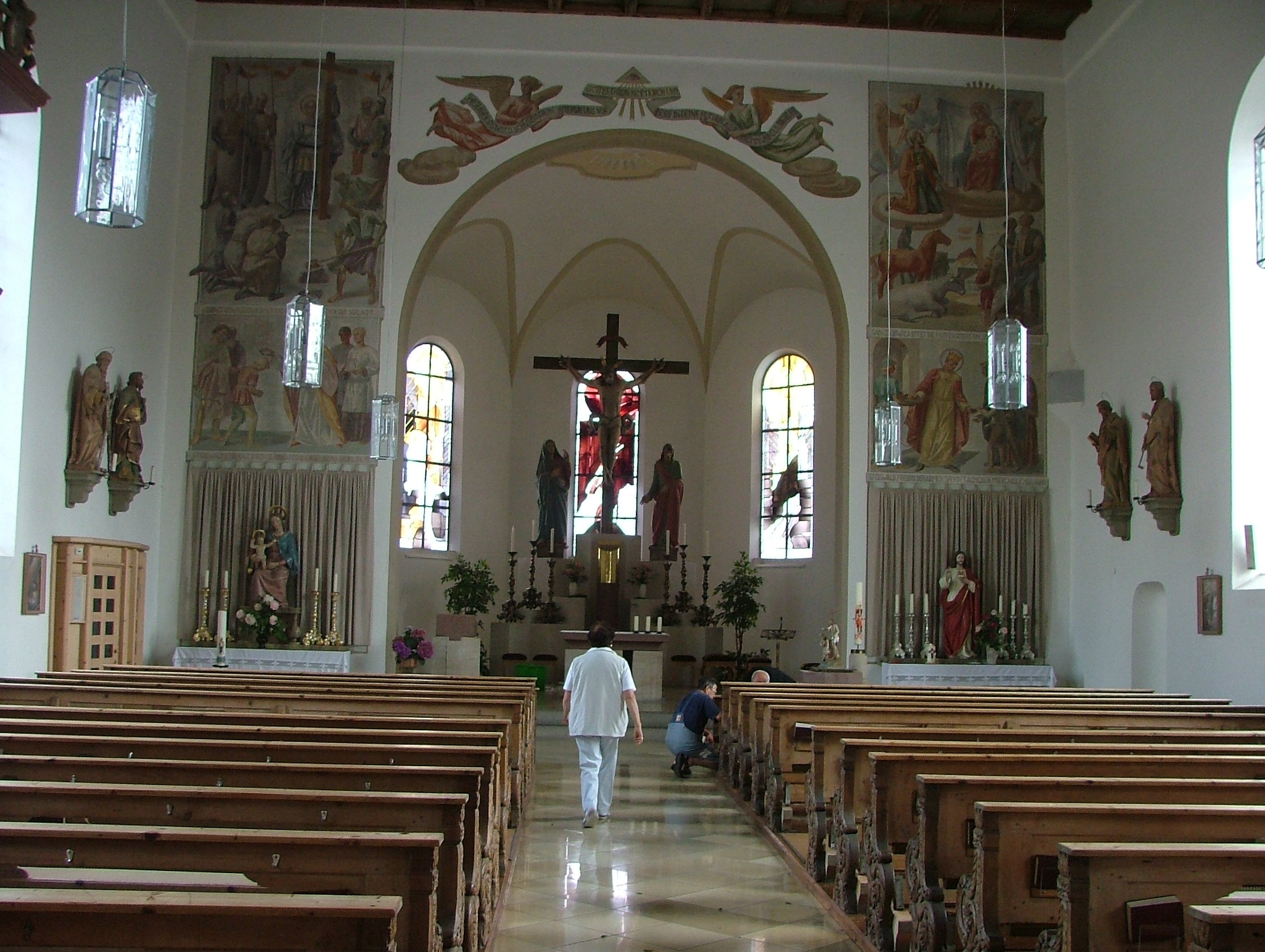 Görisried Kirche